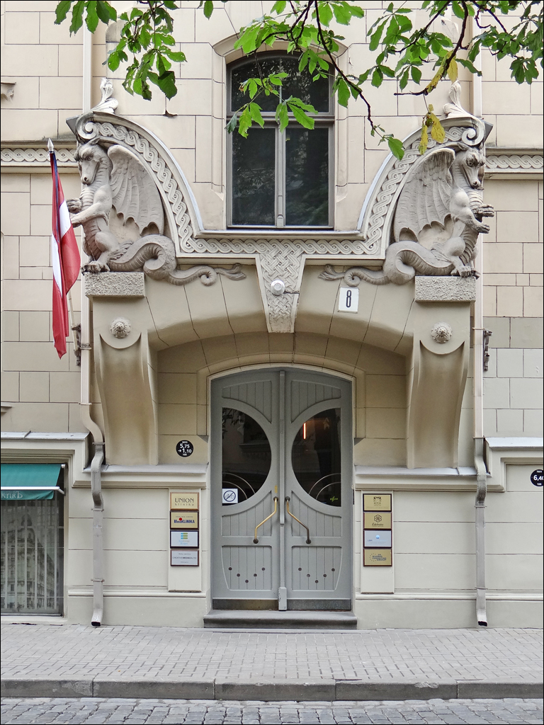 Entrée d'un immeuble art nouveau situé au n°8 de la rue Antonijas (Antonijas Iela) à Riga L'architecte de ce bâtiment conçu en 1903 est Konstantins Peksens (1859-1928) Les décors de dragons sont relativement fréquents dans les immeubles art nouveau de Riga Site du musée d'art nouveau sur cet immeuble